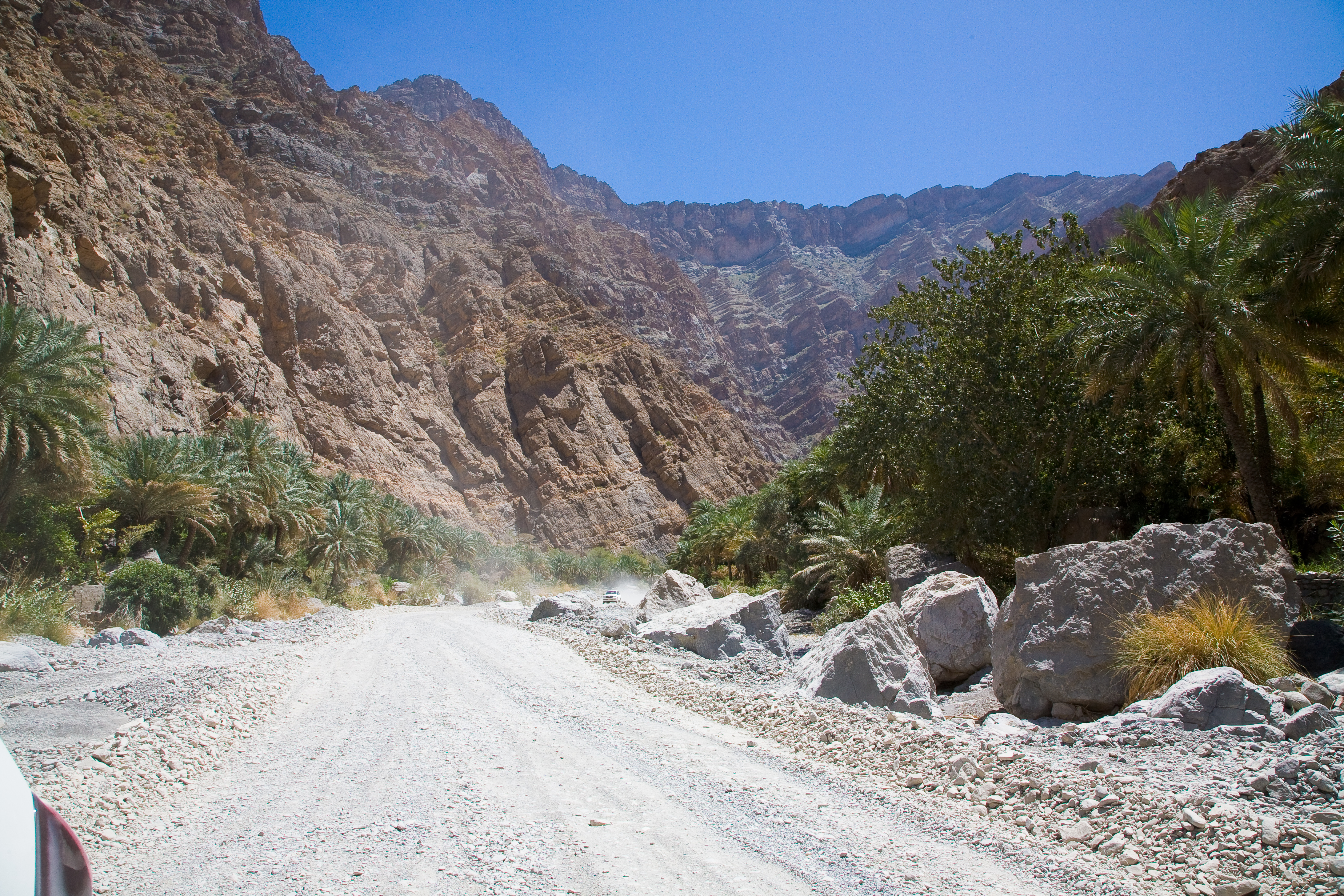 Wadi Bani Awf, Oman